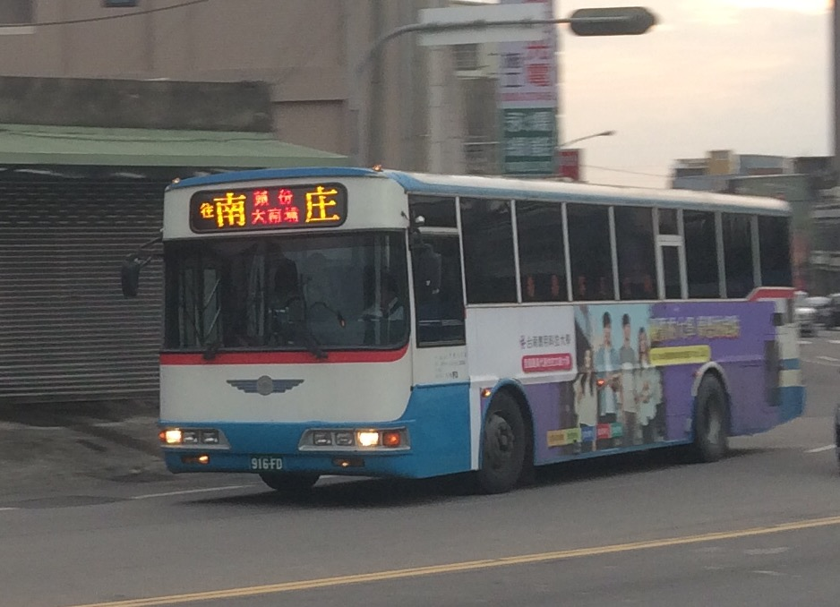 苗栗客運日野ERK2JRL大客車916-FD，行駛於苗栗縣頭份市中正一路。